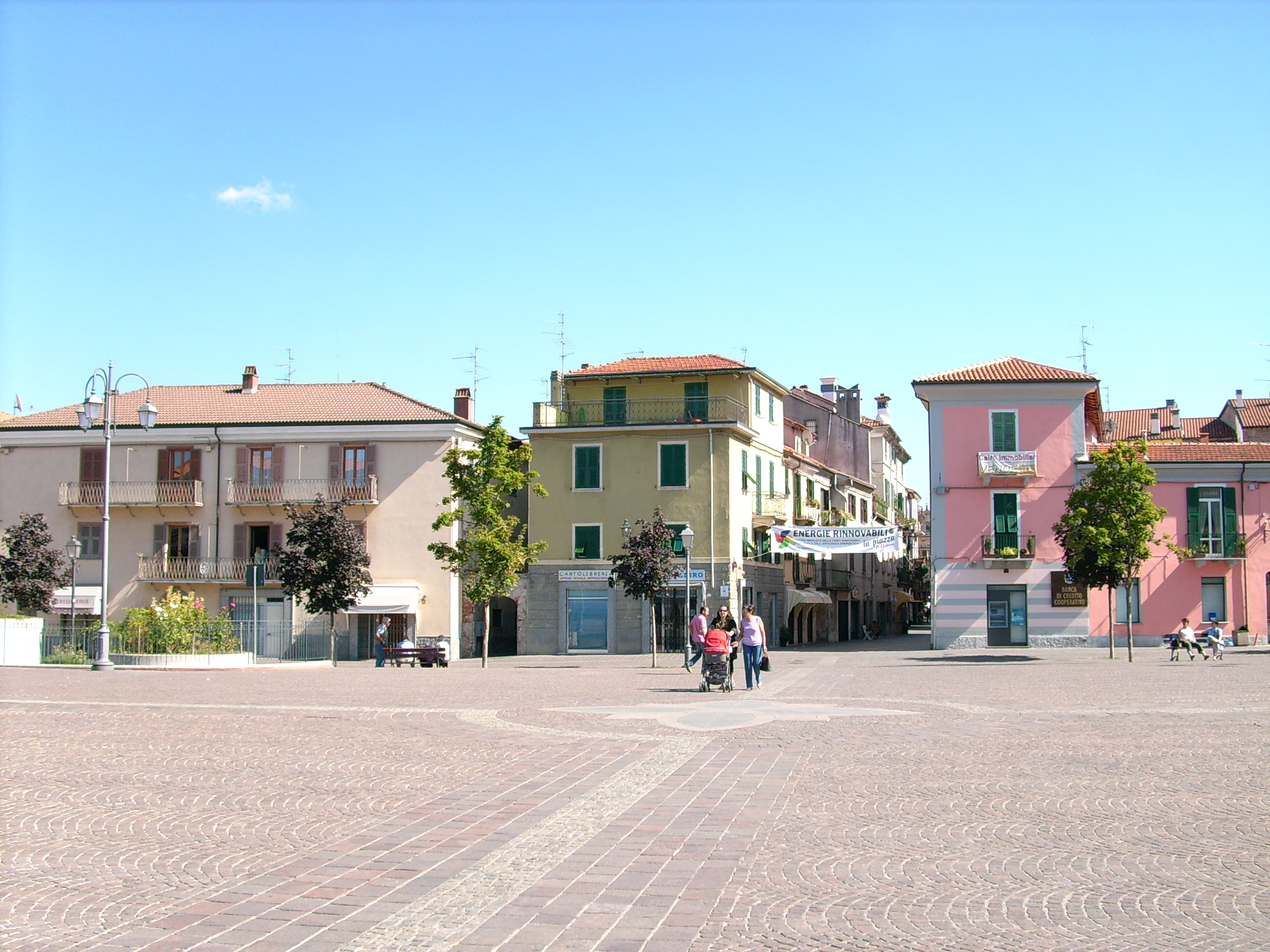 Cairo Montenotte, Liguria, Italia